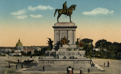 Beeld van Giuseppe Garibaldi te Rome, vermoedelijk bezocht tijdens een verlofreis vanuit Nederlands-Indië naar Nederland of vice versa. Image code 123880. Keywords Italy, statues, town views. Prentbriefkaart Size 8,5x13,5cm